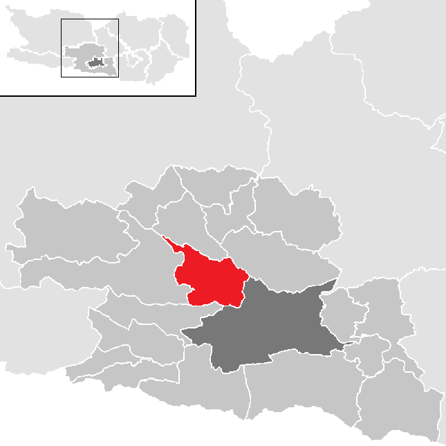 Bezirk Villach-Land